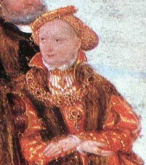 Margaret of Brandenburg (1511-1577), Princess of Brandenburg by birth and by marrying first a Duchess of Pomerania and later a Princess of Anhalt